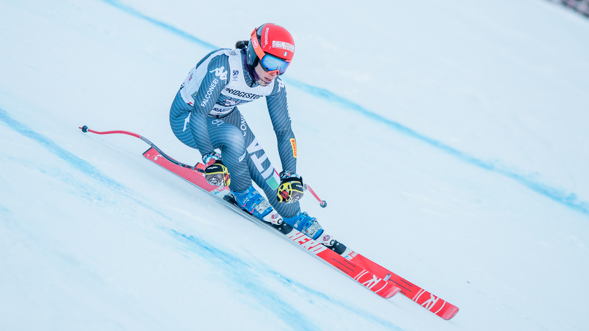 64. Kandahar Rennen,Audi FIS Ski Weltcup Garmisch-Partenkirchen,Damen Abfahrt,Federica Brignone,Kandahar,Ladies Downhill